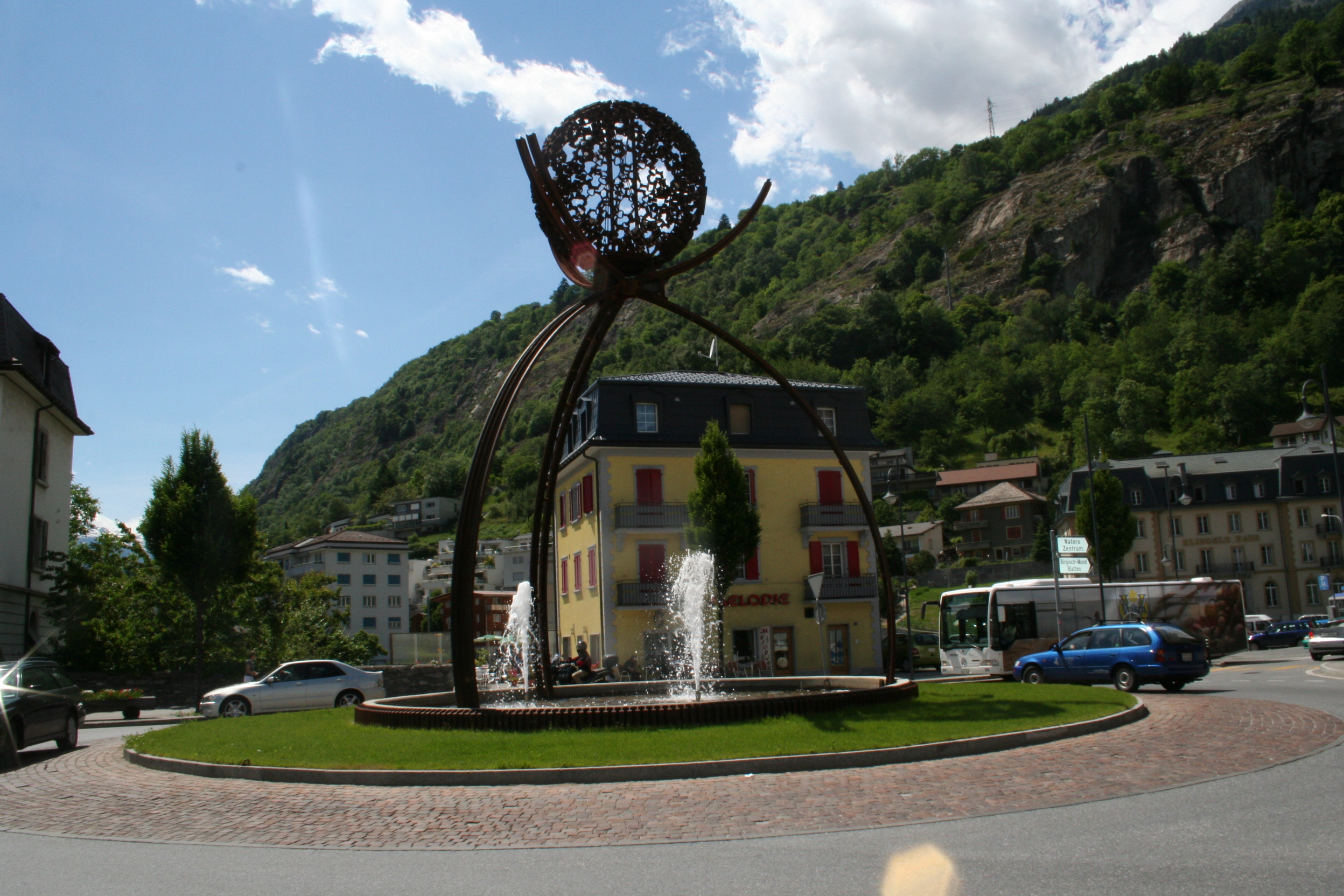 Brunnenplastik "Sonnengesang" von e.w. bregy